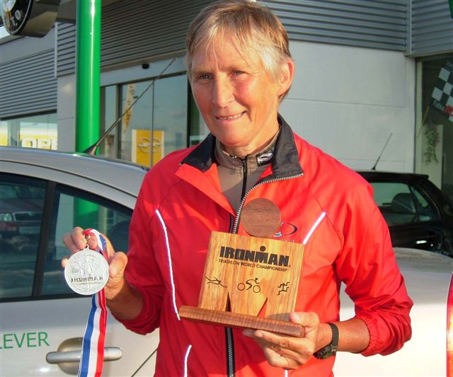 Elisabeth Onißeit mit Medaille